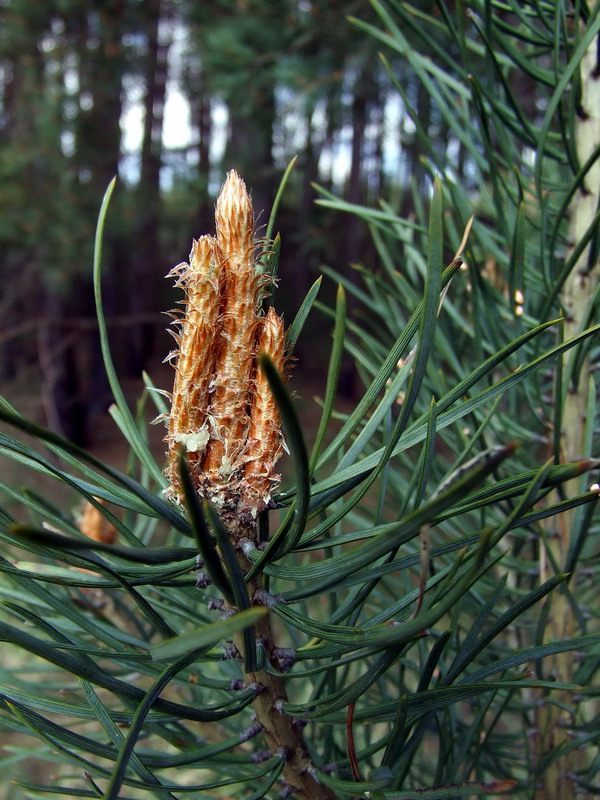 Pinus sylvestris. Veseluvka, Jonava district, Lithuania.